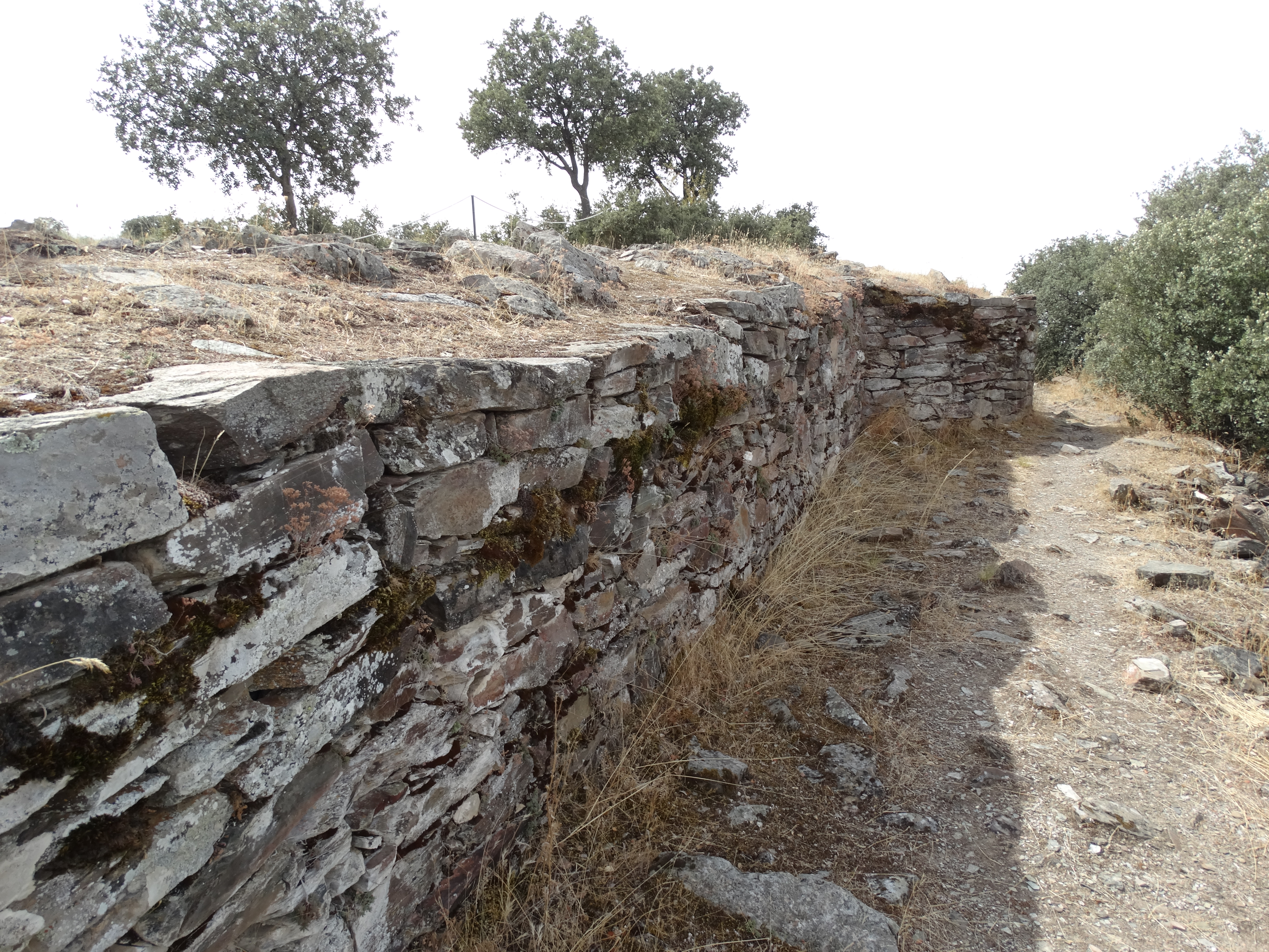 Bernardos, provincia de Segovia, España. Fortificación tardorromana datada de principios del siglo V d.C., a 900 m de altitud. Es de 4 m de espesor por 2,5 de altura, flanqueada por cubos macizos semicirculares. Se mantuvo durante la época visigoda y musulmana.